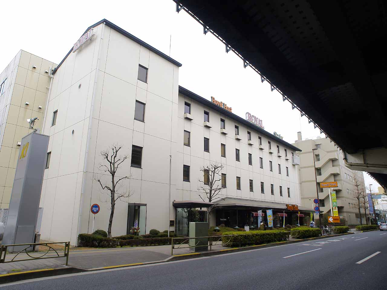 世田谷区桜新町にあるロイヤルホールディングス東京本社。国道246号と首都高渋谷線に面していて、1階にロイヤルホスト桜新町店を構える。画面奥が渋谷方面。